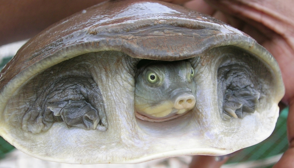 Lissemys punctata, Bannerghatta Rehabilitation Centre, Bangalore